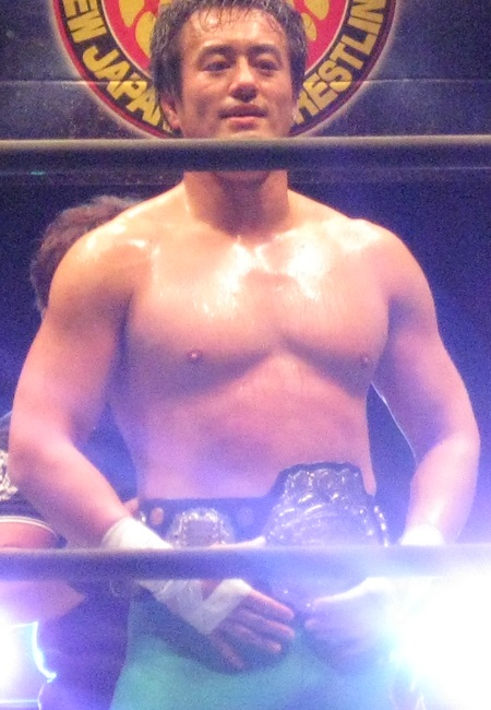 2014年9月21日 神戸ワールド記念ホール 「DESTRUCTION in KOBE」 IWGPジュニアヘビー級王座を腰に巻く田口隆祐